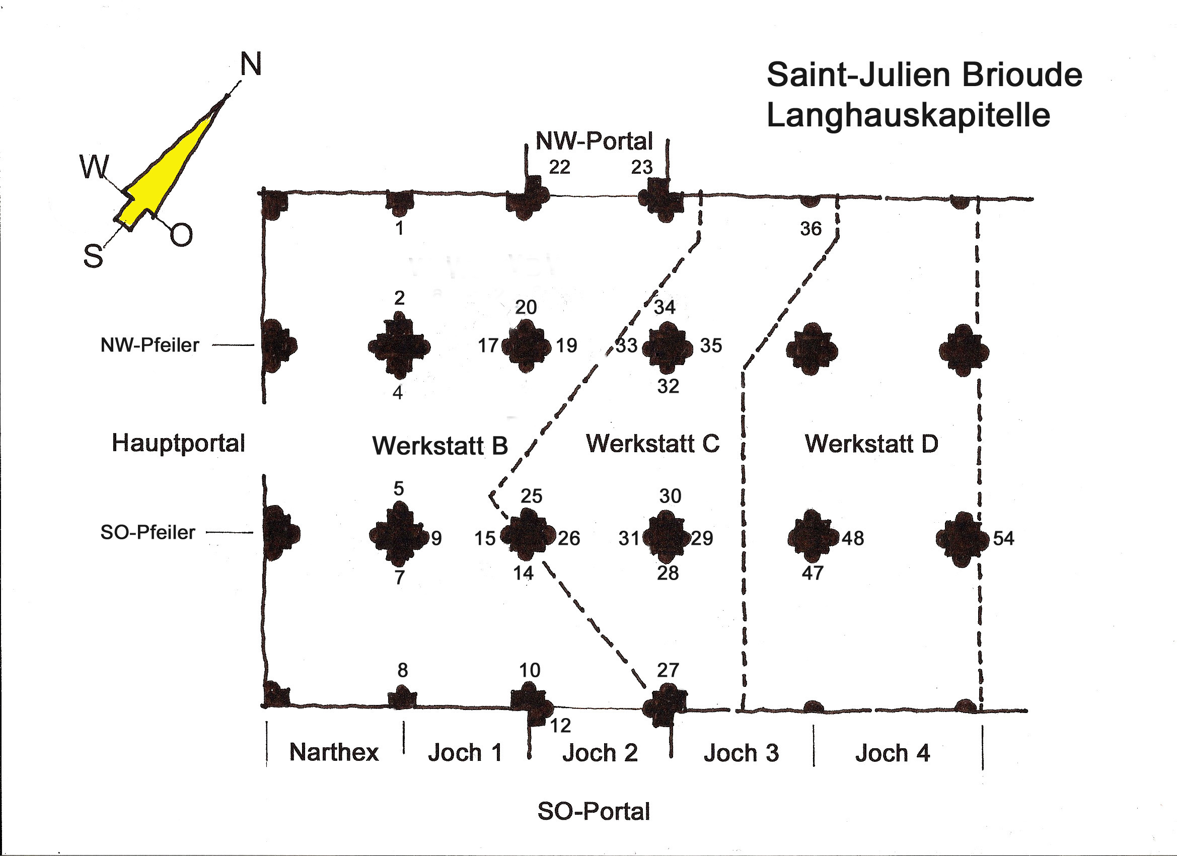 Saint-Julien Brioude, Lage der Langhauskapitelle, Handskizze